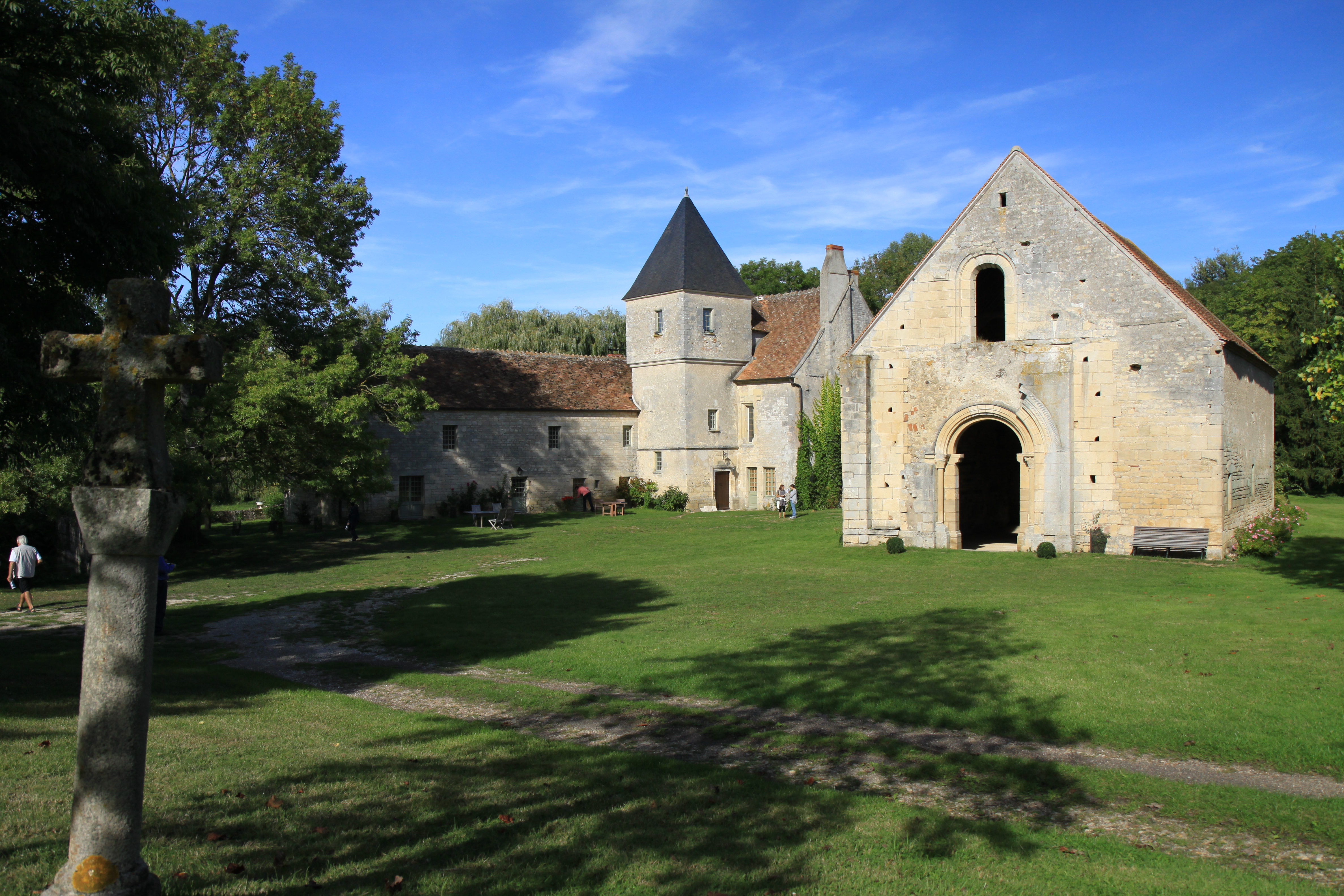 Vue d'ensemble de la commanderie de Villemoison.